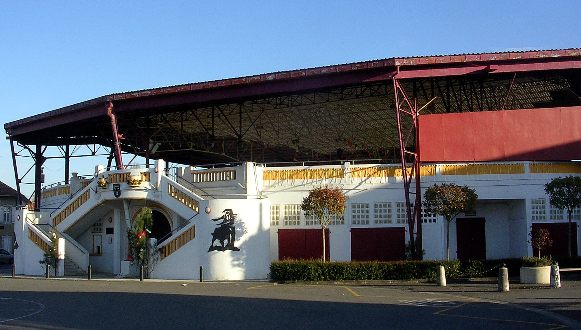 Arènes de Pomarez en Chalosse, département des Landes, France